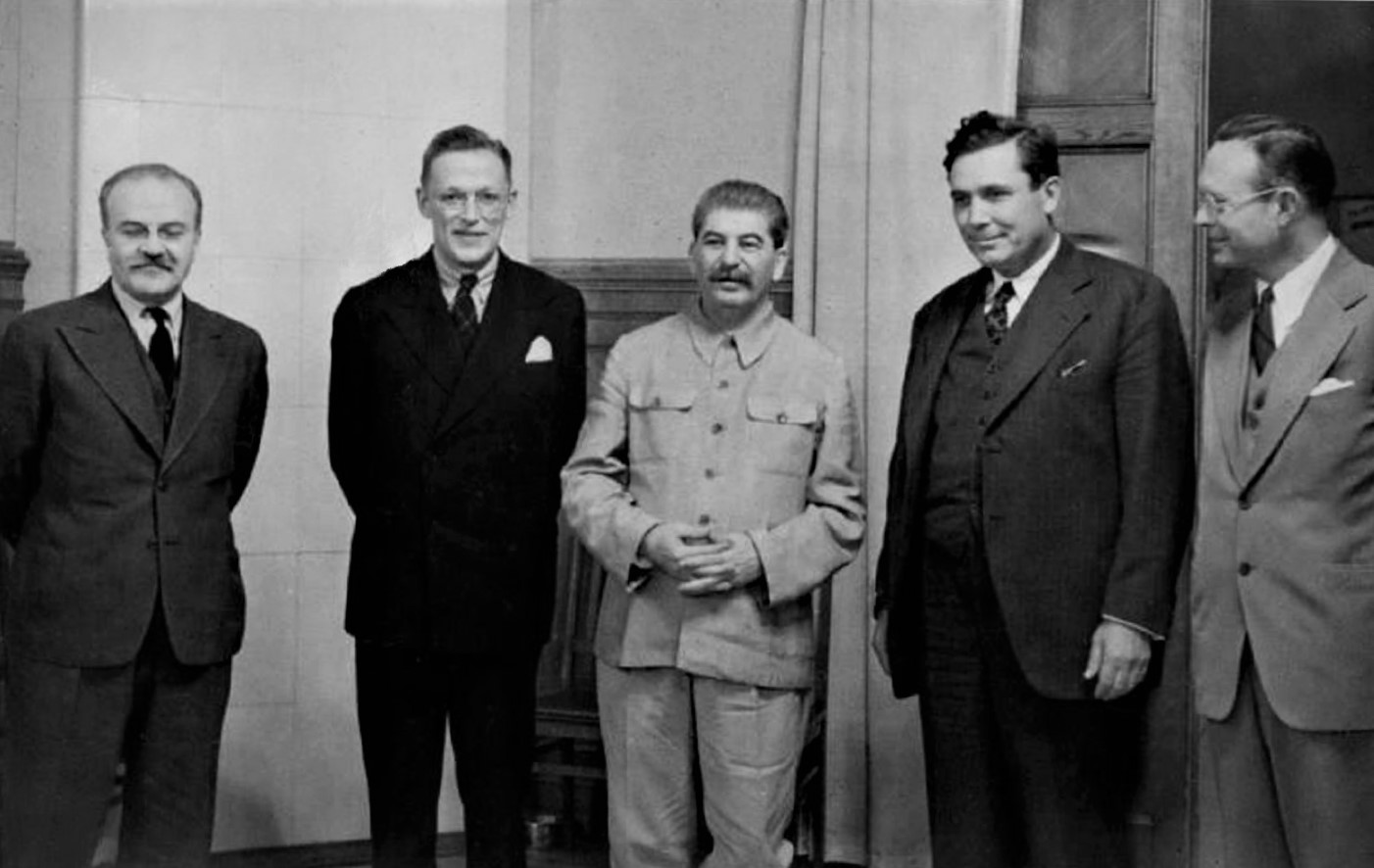 Иосиф Сталин принимает личного представителя Президента США г-на Уэнделла Уилки: слева направо: министр иностранных дел СССР Вячеслав Молотов, личный фотограф представителя президента США Ральф Барнес, Председатель Государственного комитета обороны СССР Иосиф Сталин, личный представитель Президента США г-н Уэнделл Уилки и член американской делегации г-н Коулс (в советской прессе его фамилия была напечатана как Коудс или Коутс)